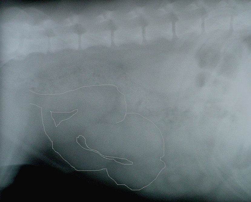 Röntgenaufnahme Pyometra Hund; das erkrankte Organ stellt sich als weichteildichte, schlauchartige Verschattung in den beiden linken Bilddritteln unterhalb der Wirbelsäule dar (zur Verdeutlichung mit Linien markiert).